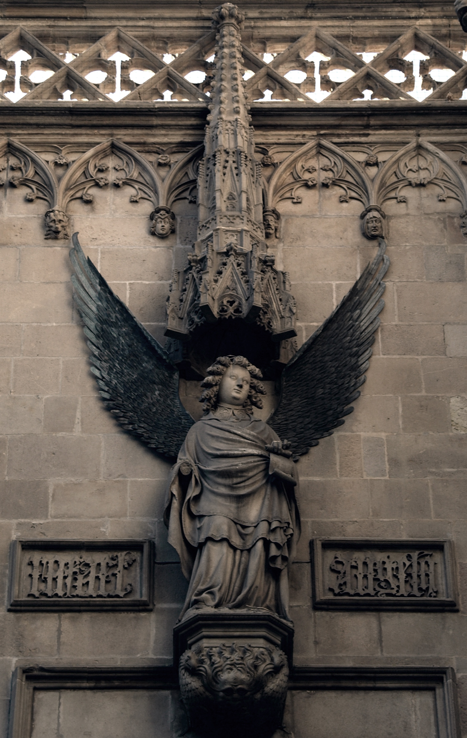 Façana antiga de l'ajuntament de Barcelona (Catalunya, Espanya) - Arcàngel Sant Rafael